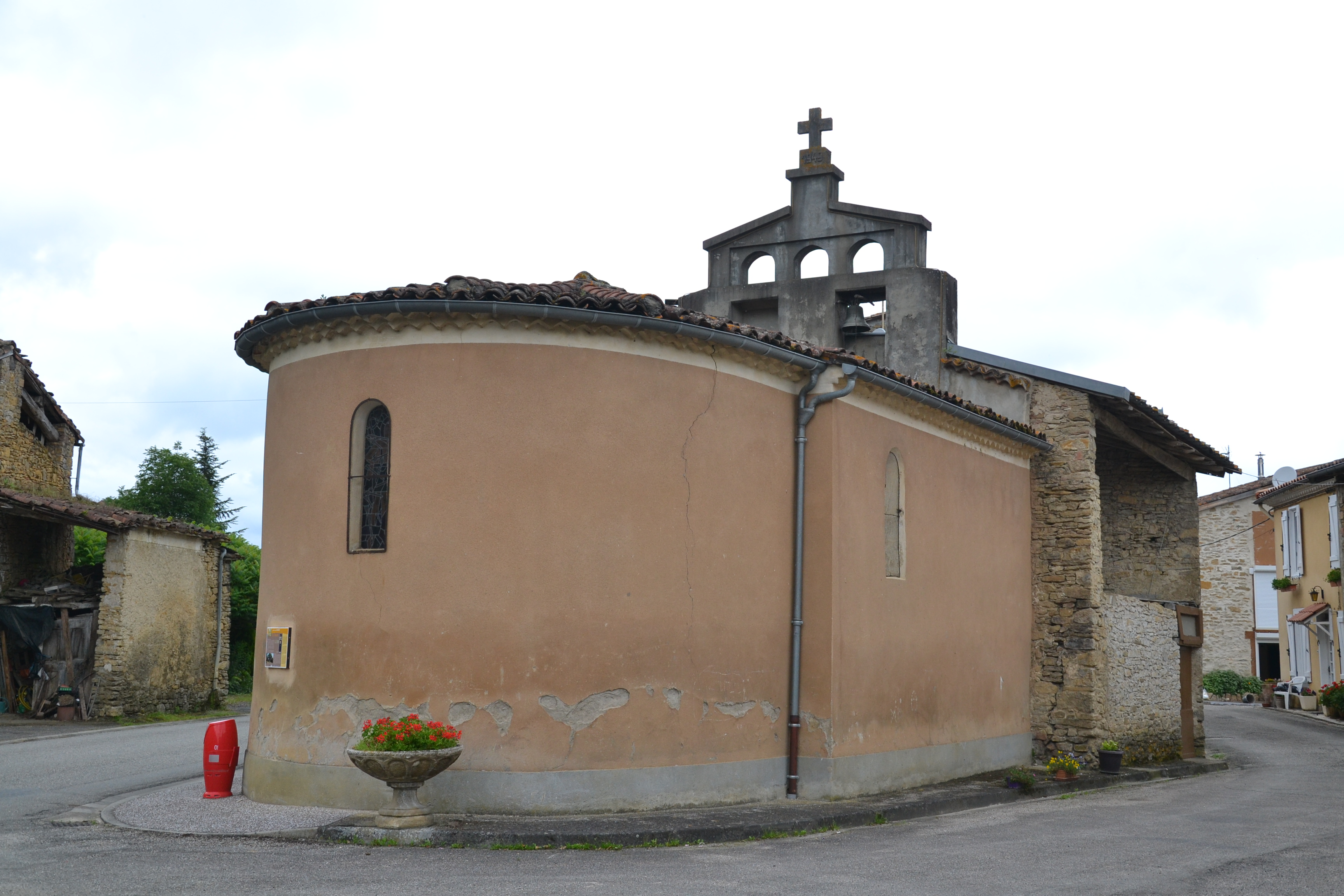 Chapelle Saint-Sébastien, Le Sautel (Ariège, France).